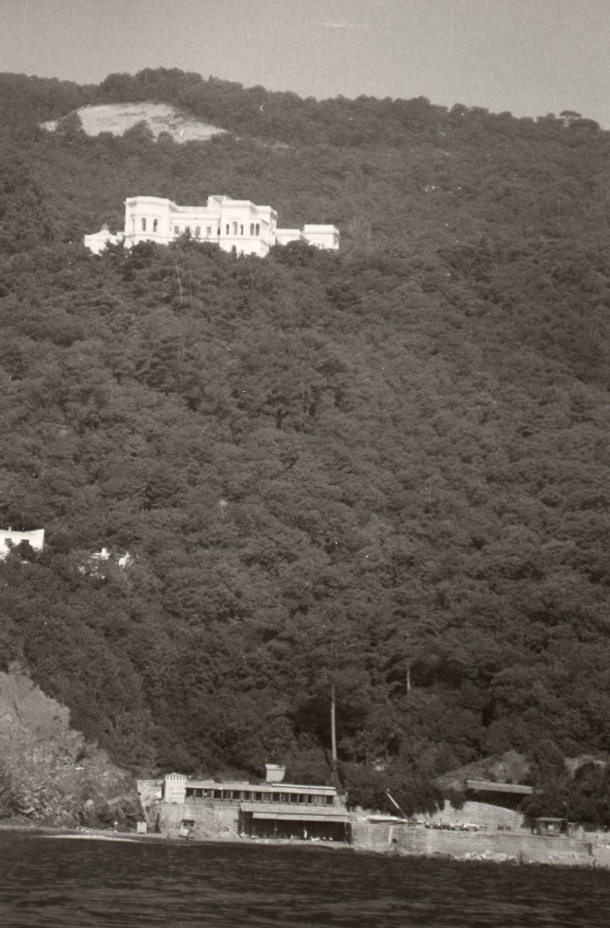 Liwadija-Palast, Jalta, Krim, Ukraine (July 1968)